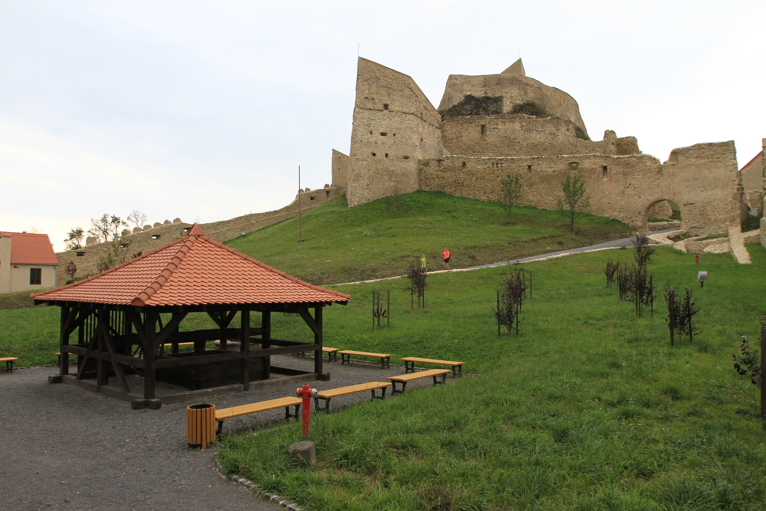 Vedere din interior, de la fantana spre cetatea superioara